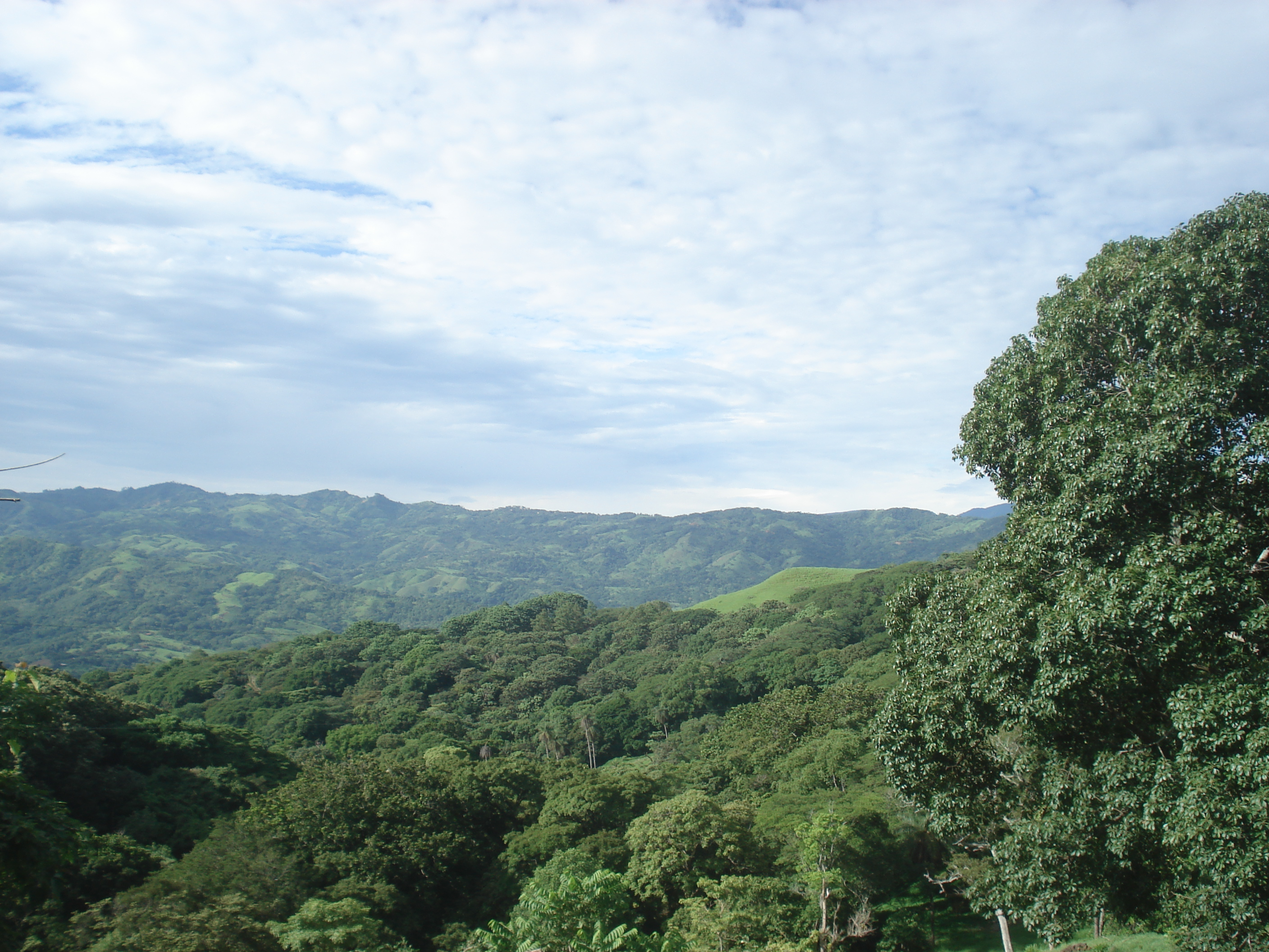 Paisaje de Guácimo, distrito de Santa Eulalia, cantón de Atenas, provincia de Alajuela, Costa Rica.